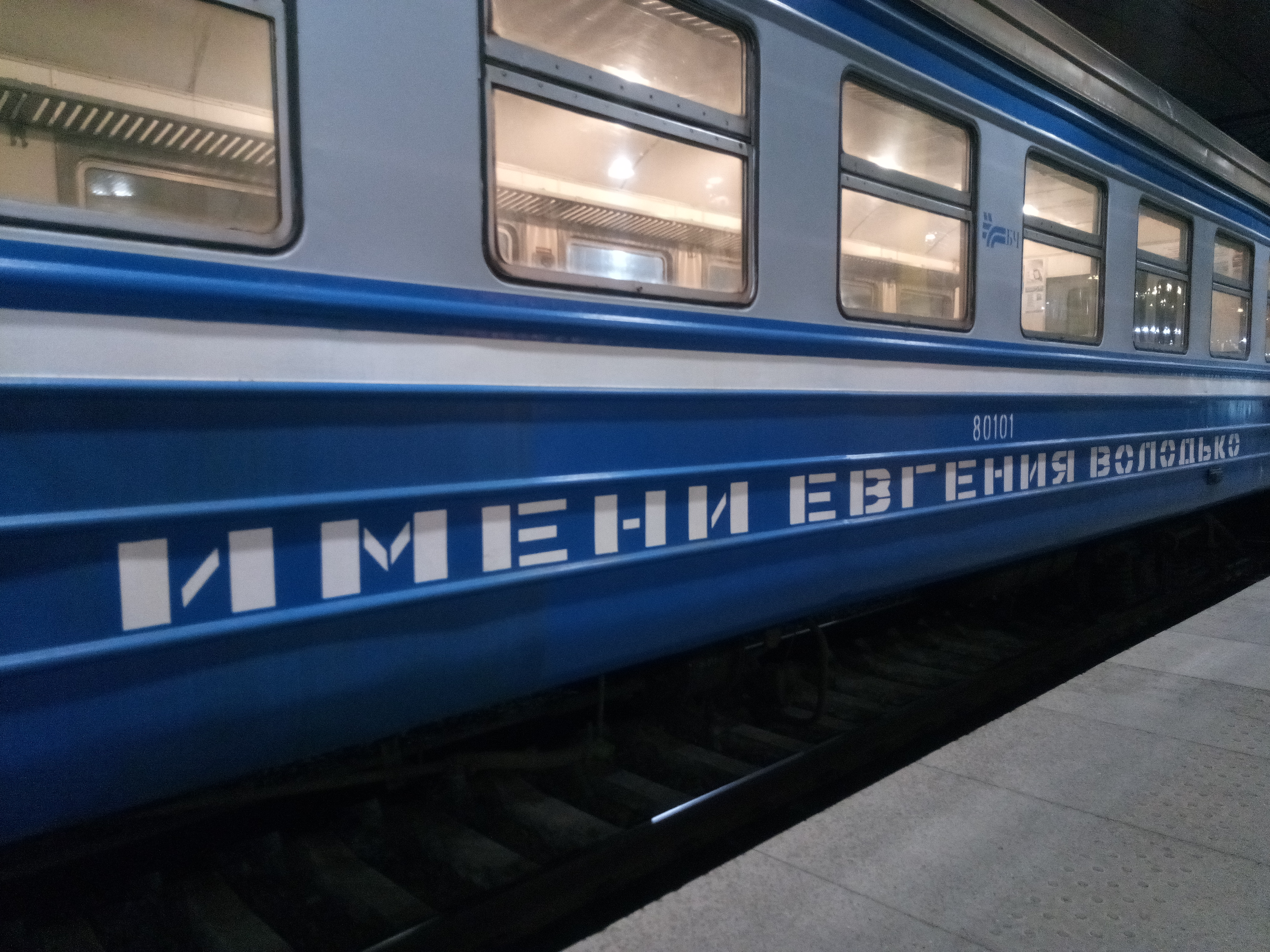 Электрацягнік ЭР9ТМ-801 названы імем Яўгена Валадзько